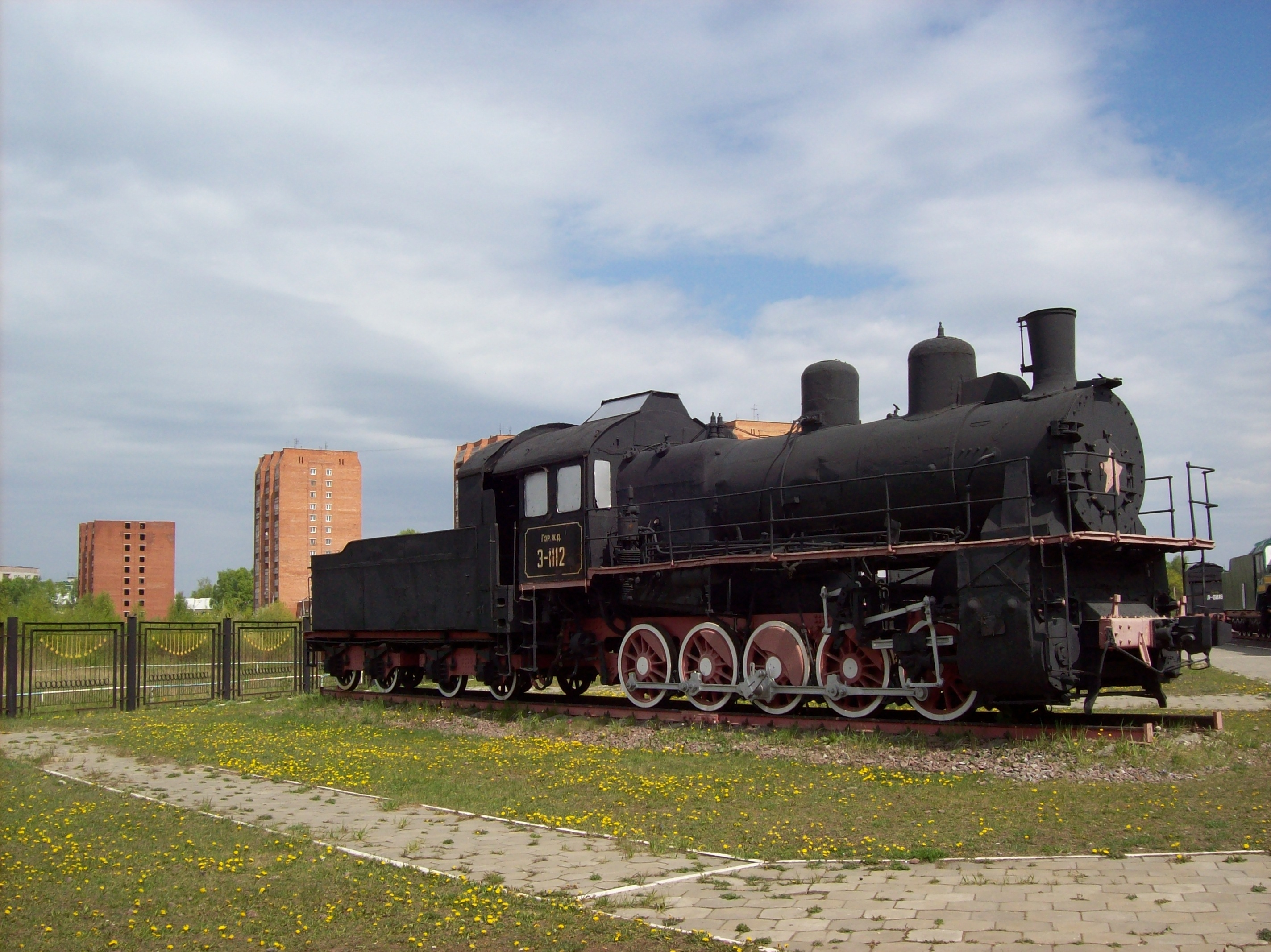 Lokomotive E-1112 (Паровоз Э-1112)